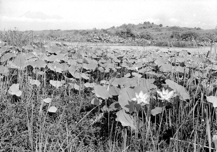 Repronegatief. Rawah Melleman, Oost-Java. Lotos-vegetatie in het moeras